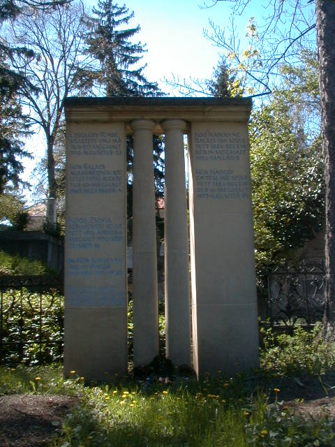 Cimitirul Hajongard Cluj-Napoca